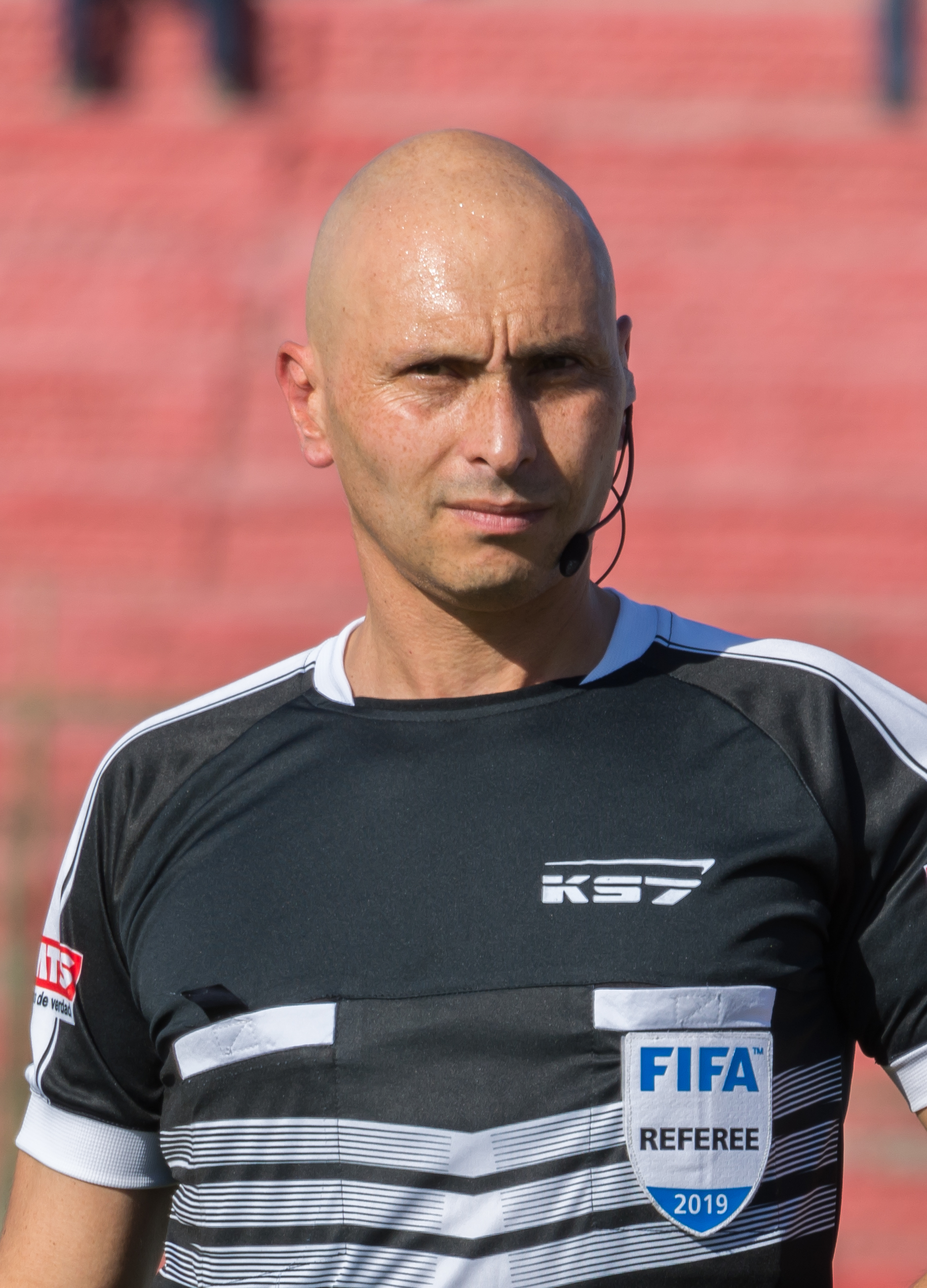 César Deischler, Palestino v O'Higgins, Estadio Municipal de La Cisterna, La Cisterna, Santiago, Chile.